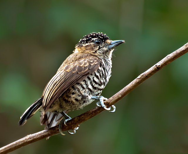 Piraju-SP - Brasil